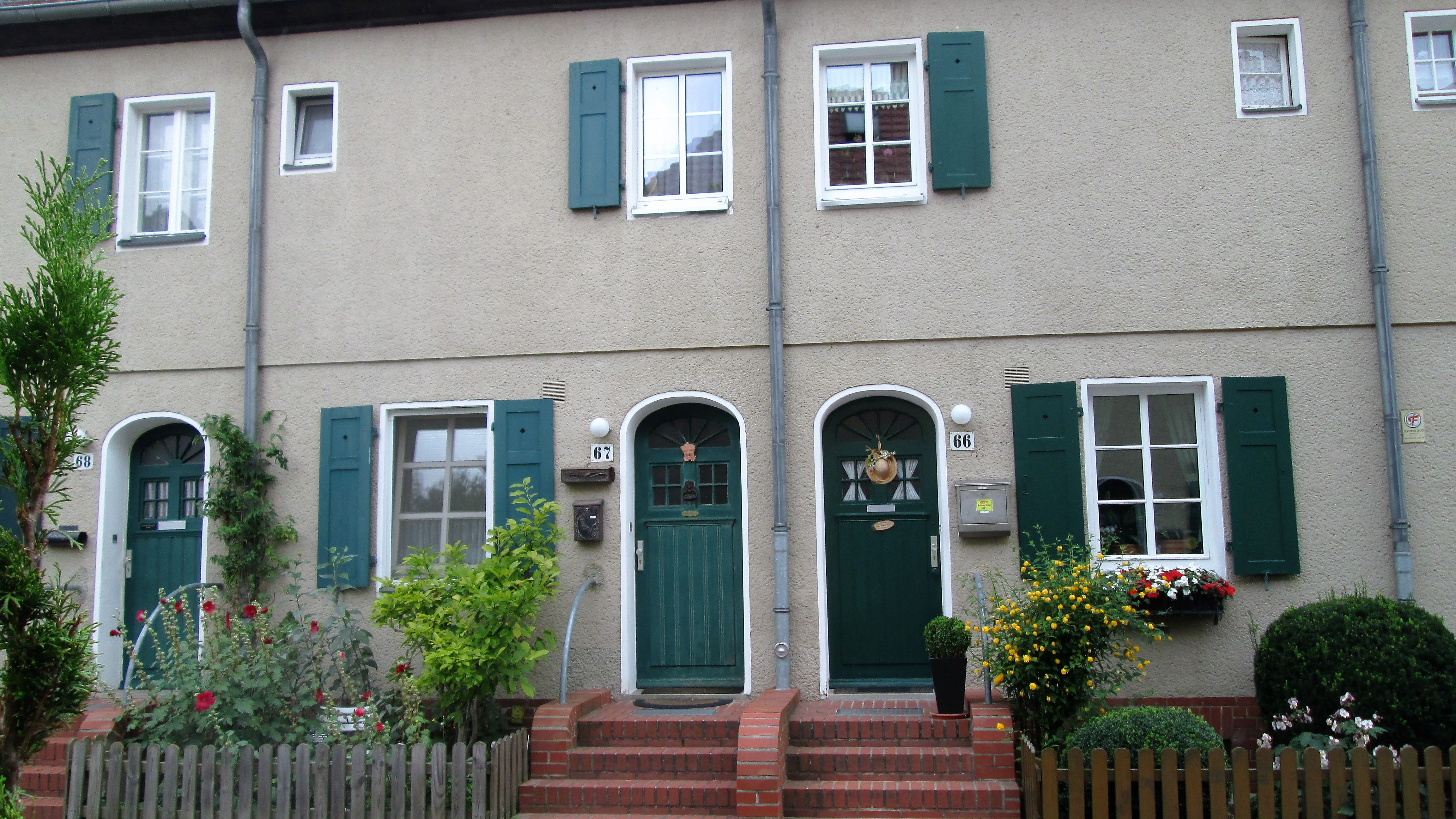 Tannenweg 66/67, Berlin-Hakenfelde (Waldsiedlung)